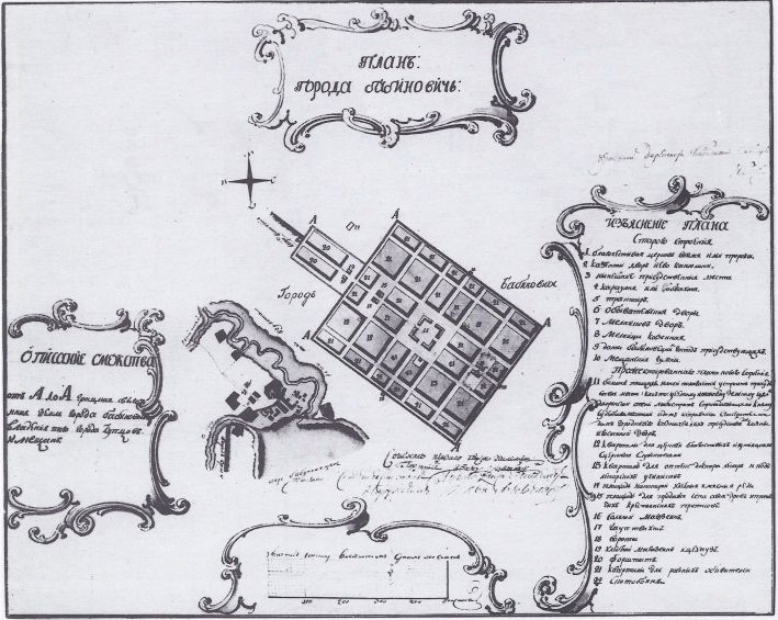 Бабінавічы. Праектны план канца XVIII ст. (РДАСА)